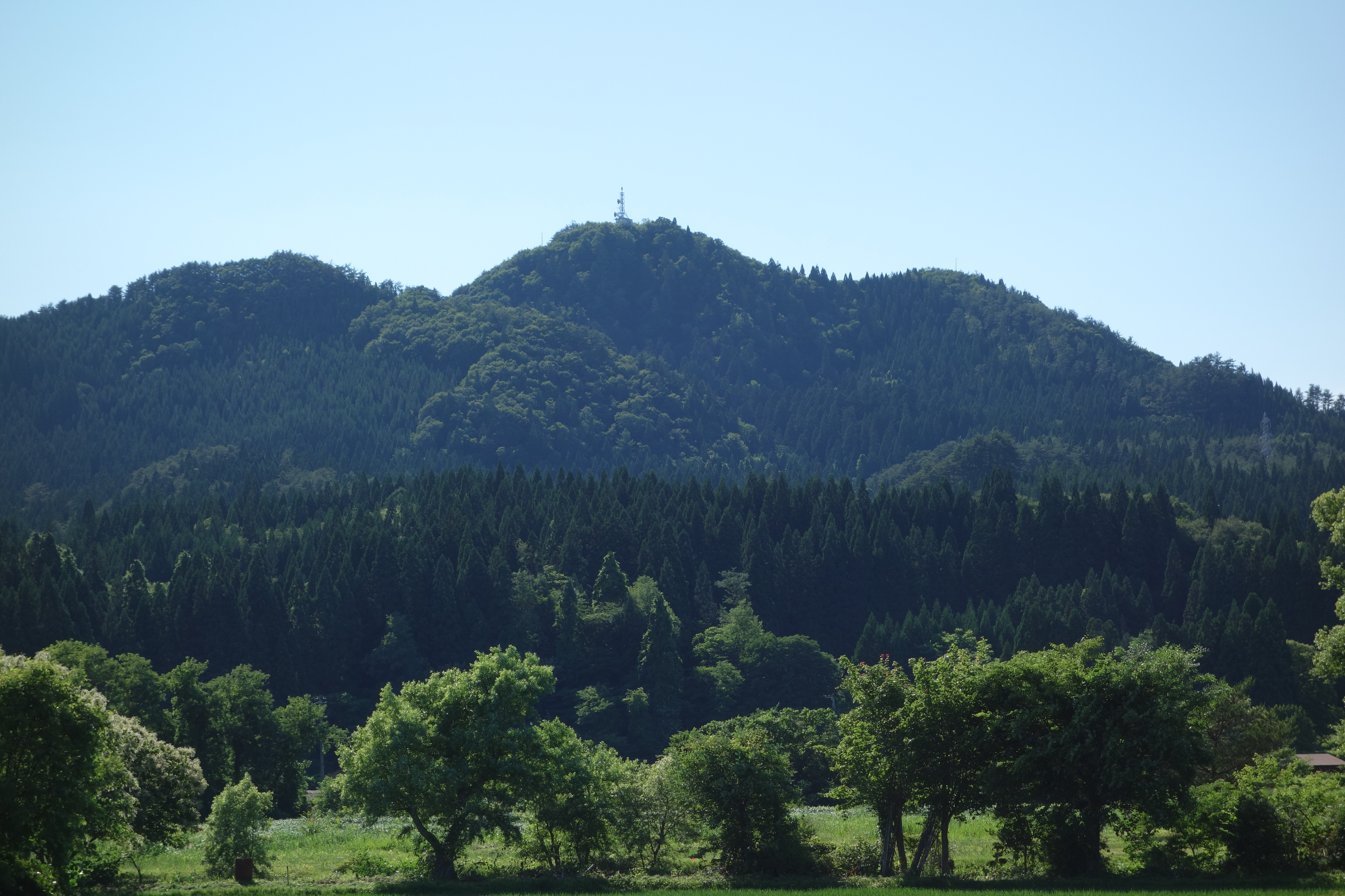 大館市松峰地区から望む 大館市大山（松峰山） 山頂にテレビ塔が見える